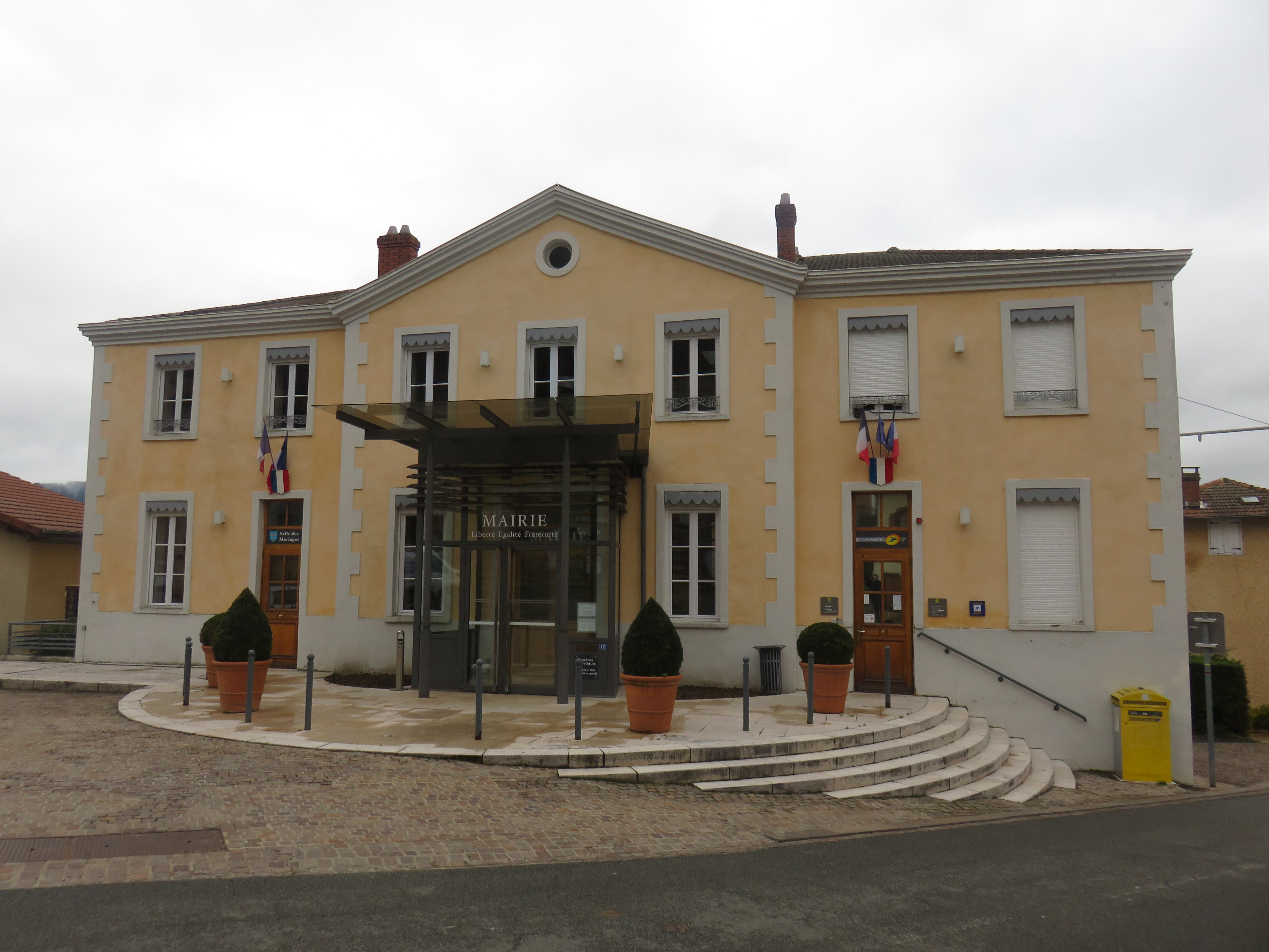 Mairie de Grandris (Rhône, France).